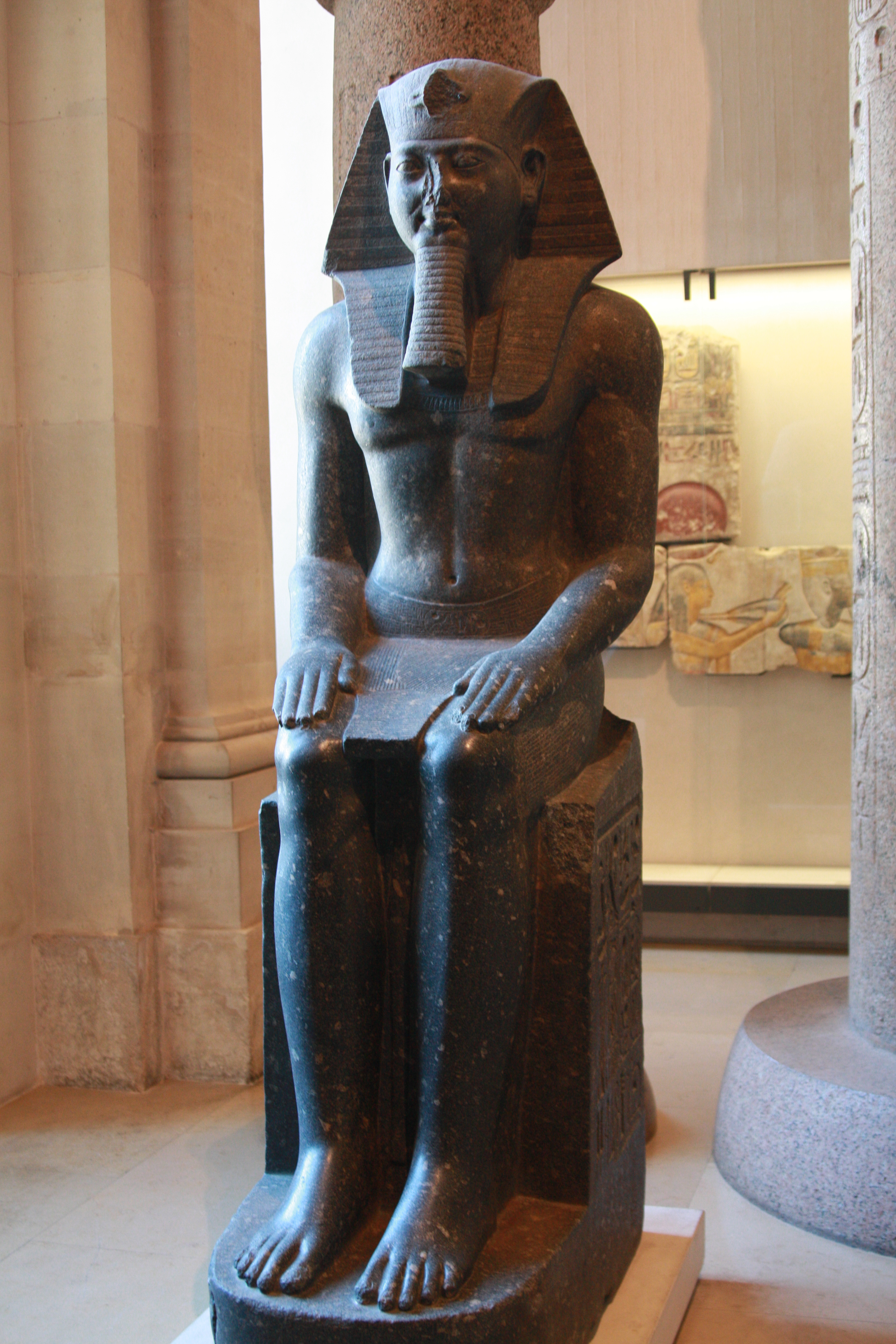 Colossal statue of Ramses II, Louvre, Paris.